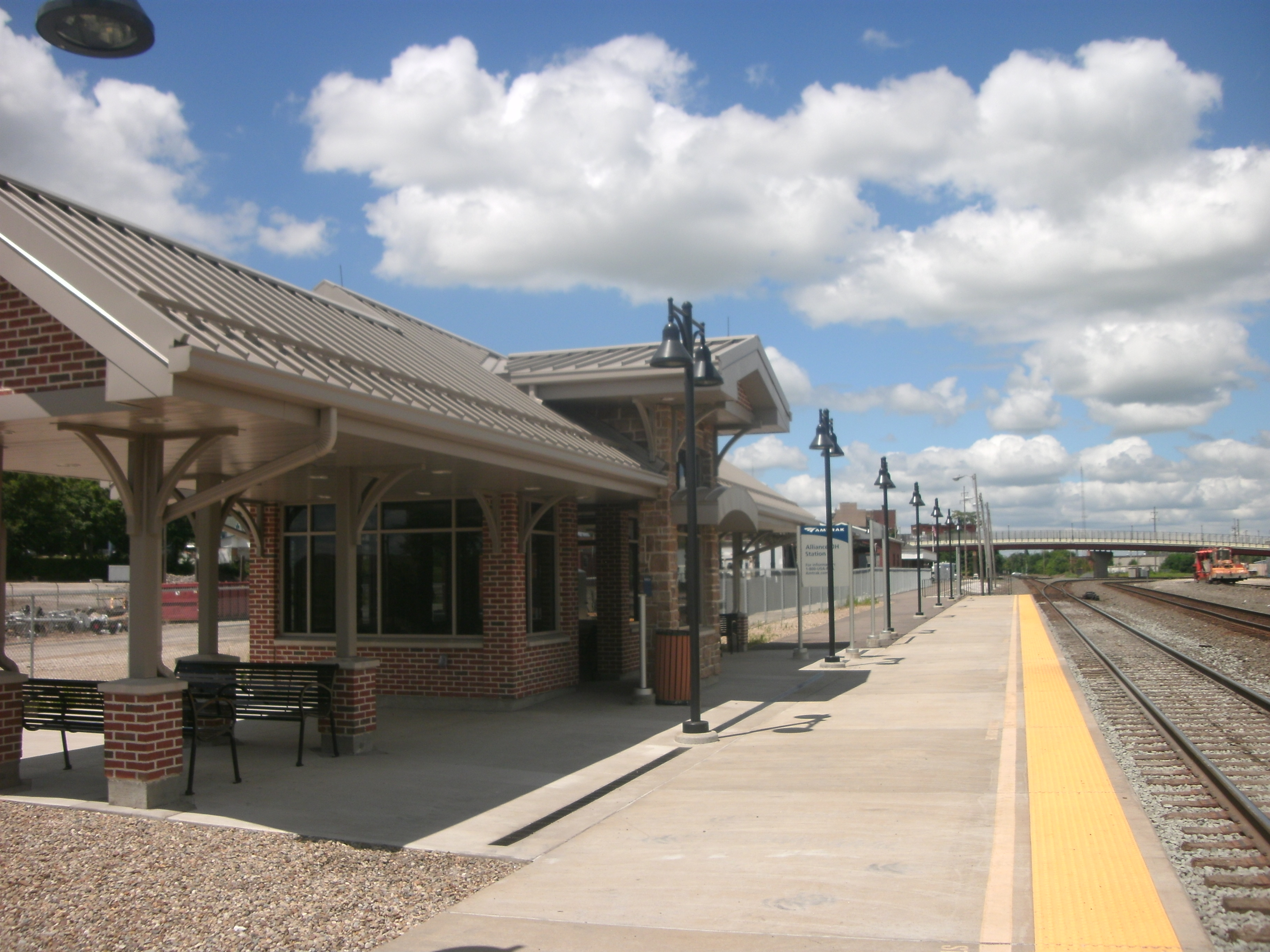 Alliance, Ohio